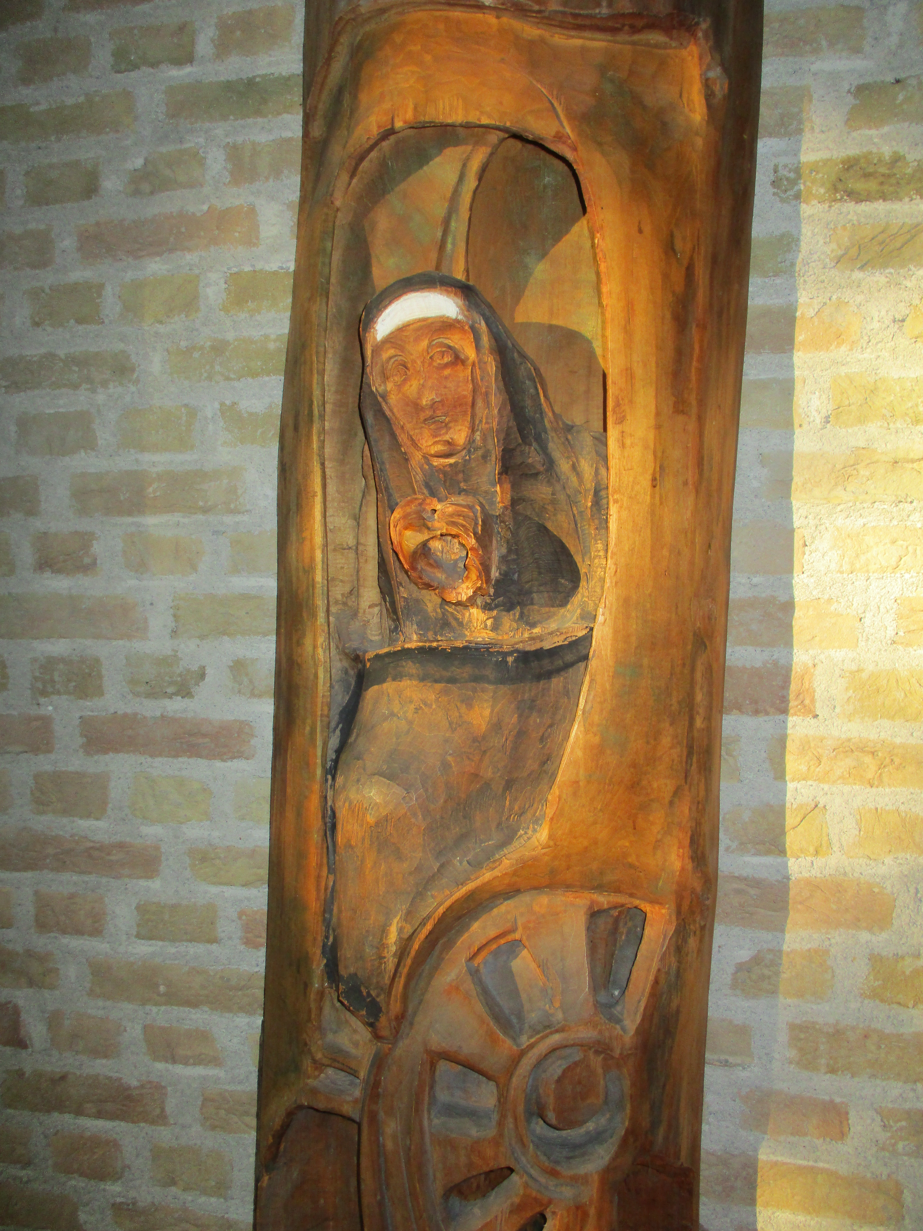 Bernardine Weber schuf die Ordensgründerin Maria Ward im Jahr 1957.